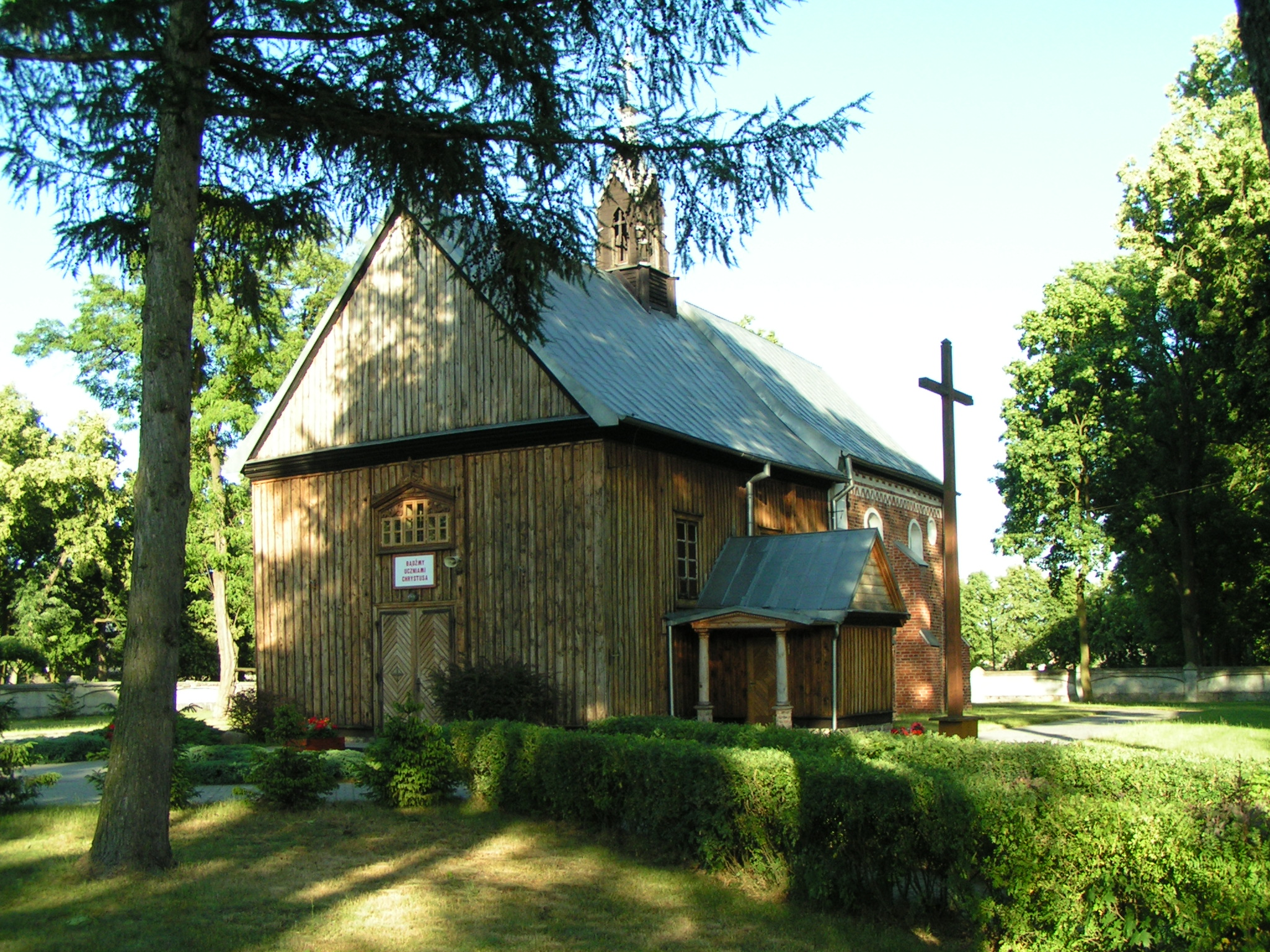 Kościół parafialny w Malużynie